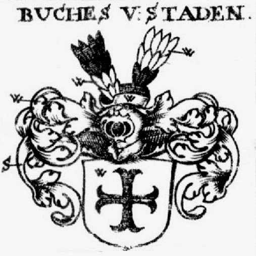 Siebmachers Wappenbuch, Tafeln der 9. Ausgabe 1701 und der 10. Ausgabe 1705, nach dem Faksimile von 1975. Tafel aus Teil 5. Büches von Staden